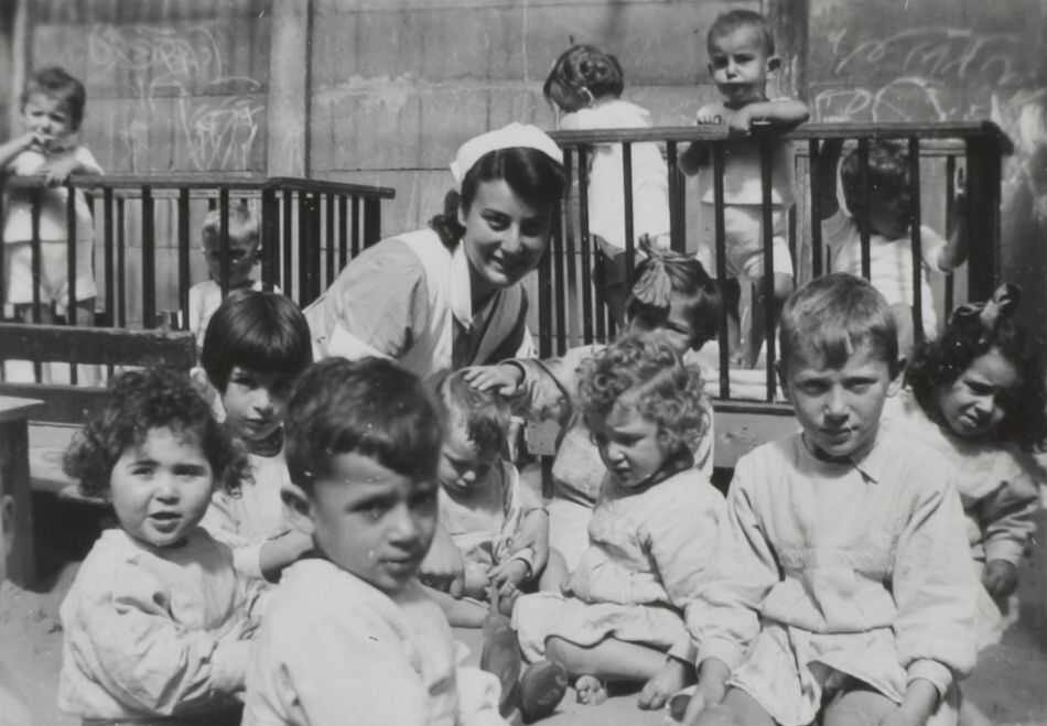 Kinderen uit de creche aan de Plantage Middenlaan in Amsterdam, circa 1942.